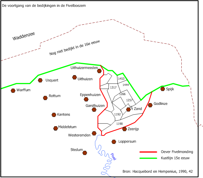 Zelf gemaakte tekening op basis van een kaart gepubliceerd in L. Hacquebord en A.L. Hempenius, Groninger dijken op Deltahoogte, Wolters Noordhoff/Egbert Forsten, Groningen, 1990, pag. 42